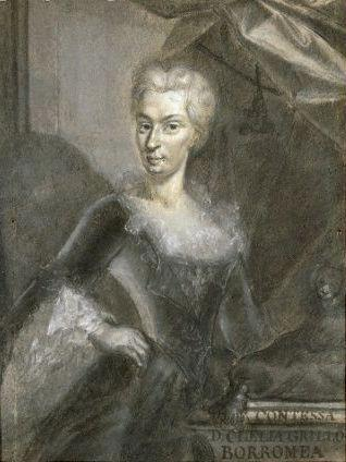 Clelia Grillo Borromeo con perrito